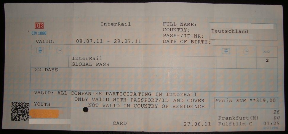 Ein 21 Tage Interrailpass / Interrailticket ( Deutsche Bahn) Bild von